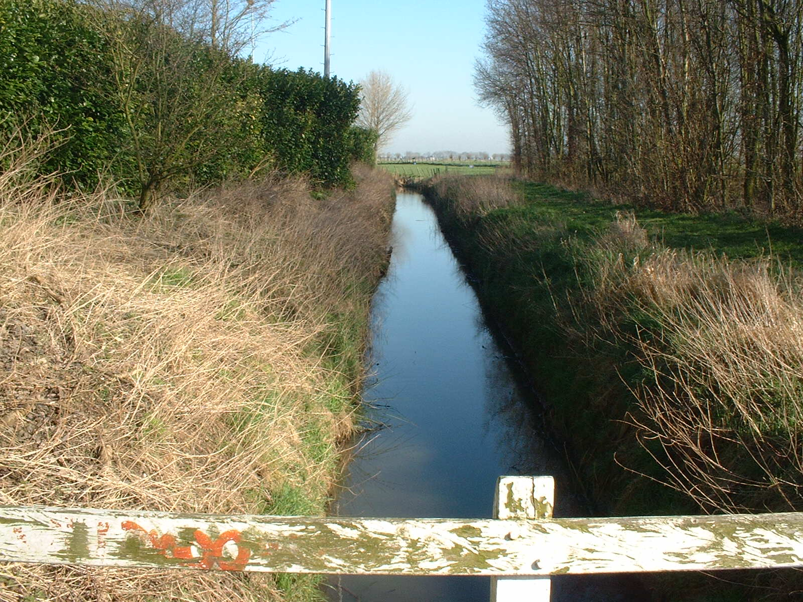 Meersloot in Ammerzoden, overblijfsel van een vroegere Maasbedding